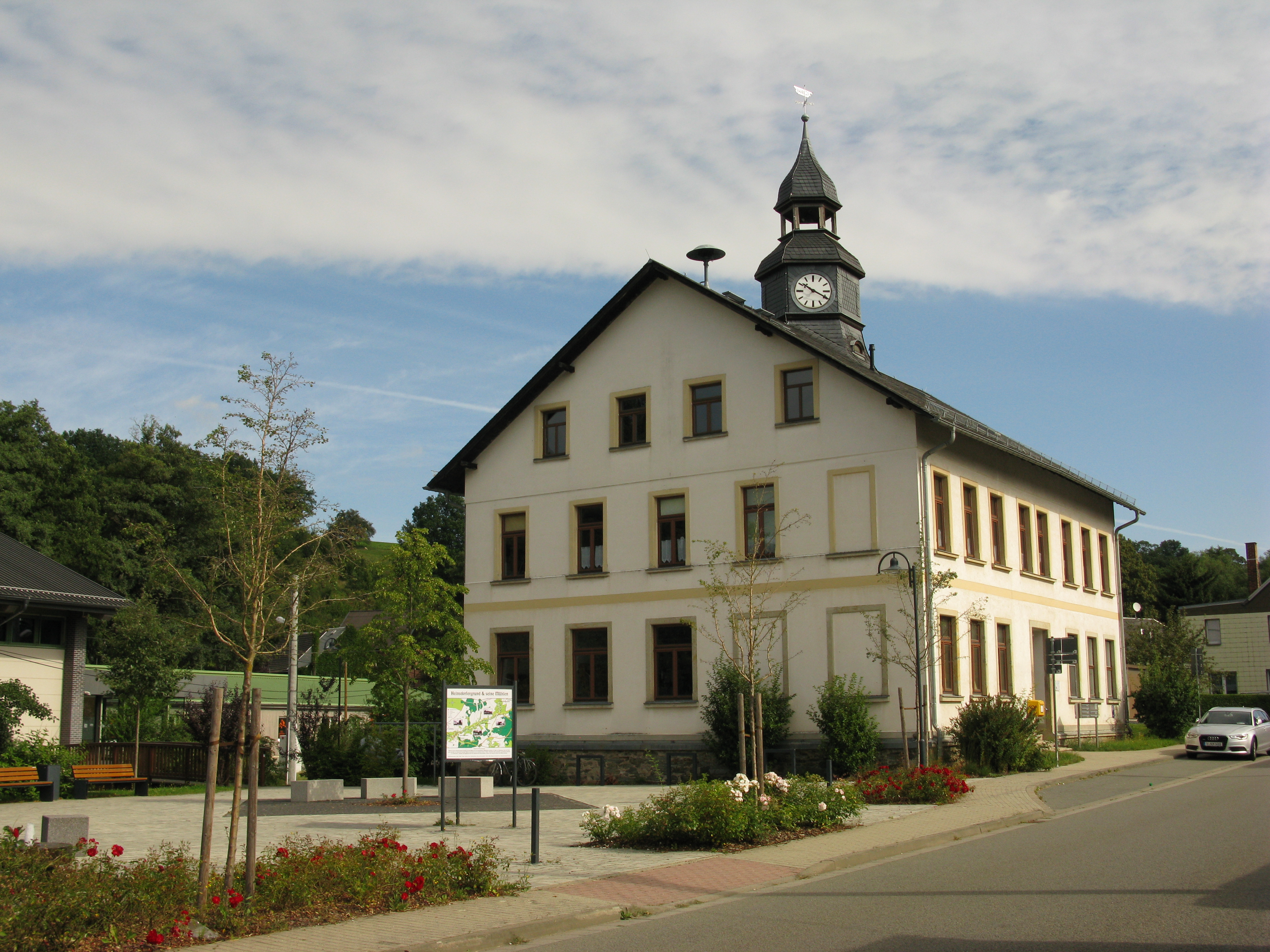 Heinsdorfergrund: Schule im Ortsteil Unterheinsdorf